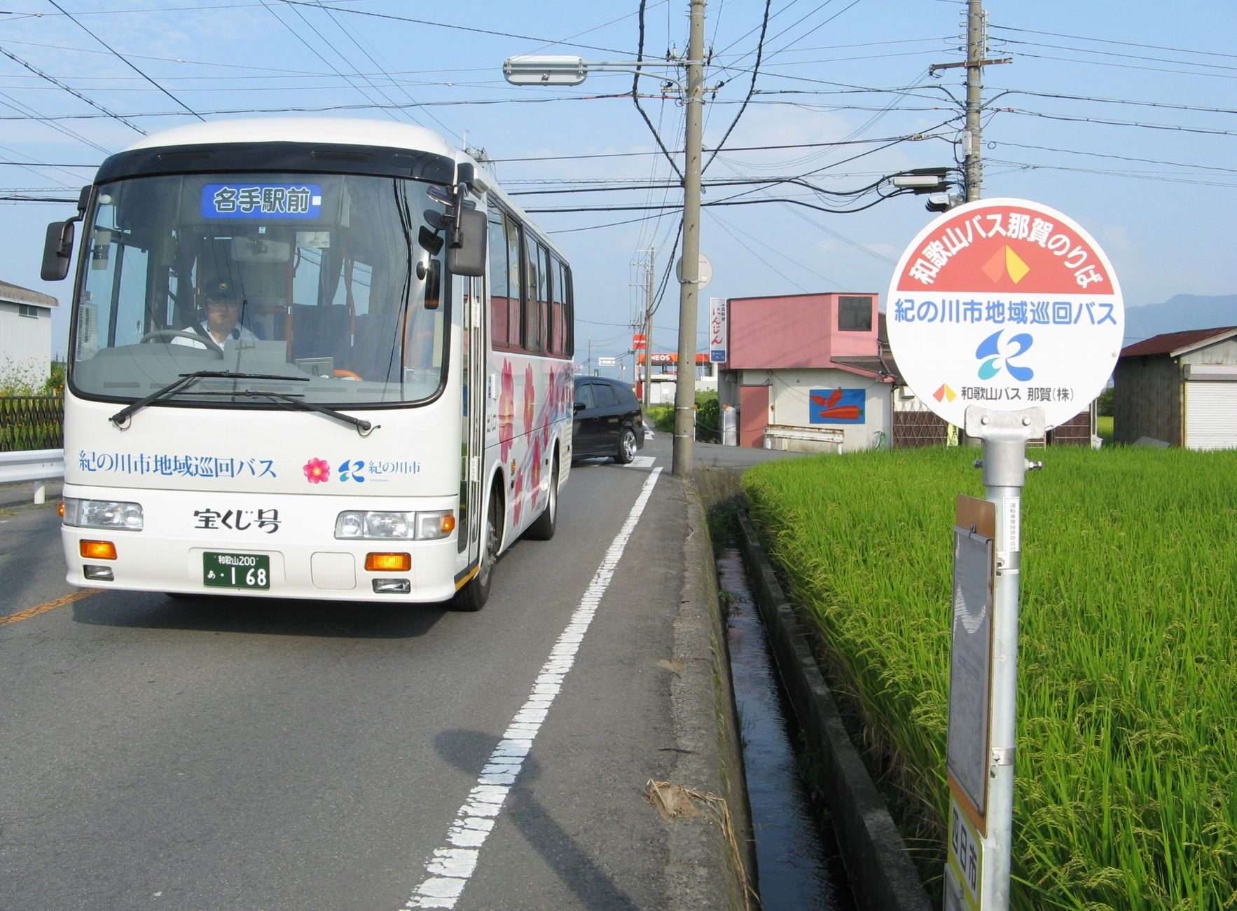 紀の川市地域巡回バス 打田麻生津コース 四日市にて